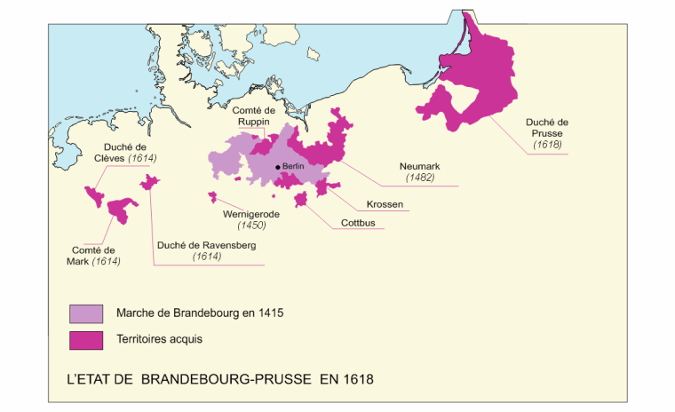 La Prusse en 1618